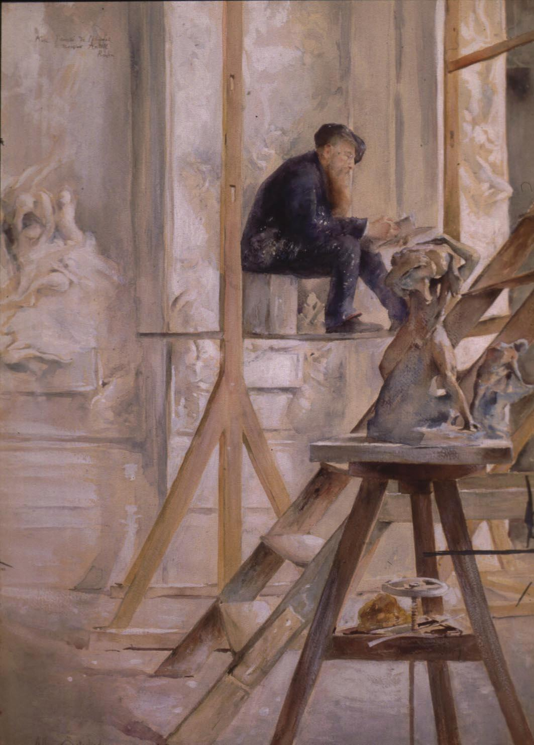 Allan Österlind, Rodin dans son atelier (1885), aquarelle, 51 x 13 cm, dédicacé par Rodin : « avec l’amitié de l’original à Mr. Antell. Rodin », Helsinki, Musée Ateneum.